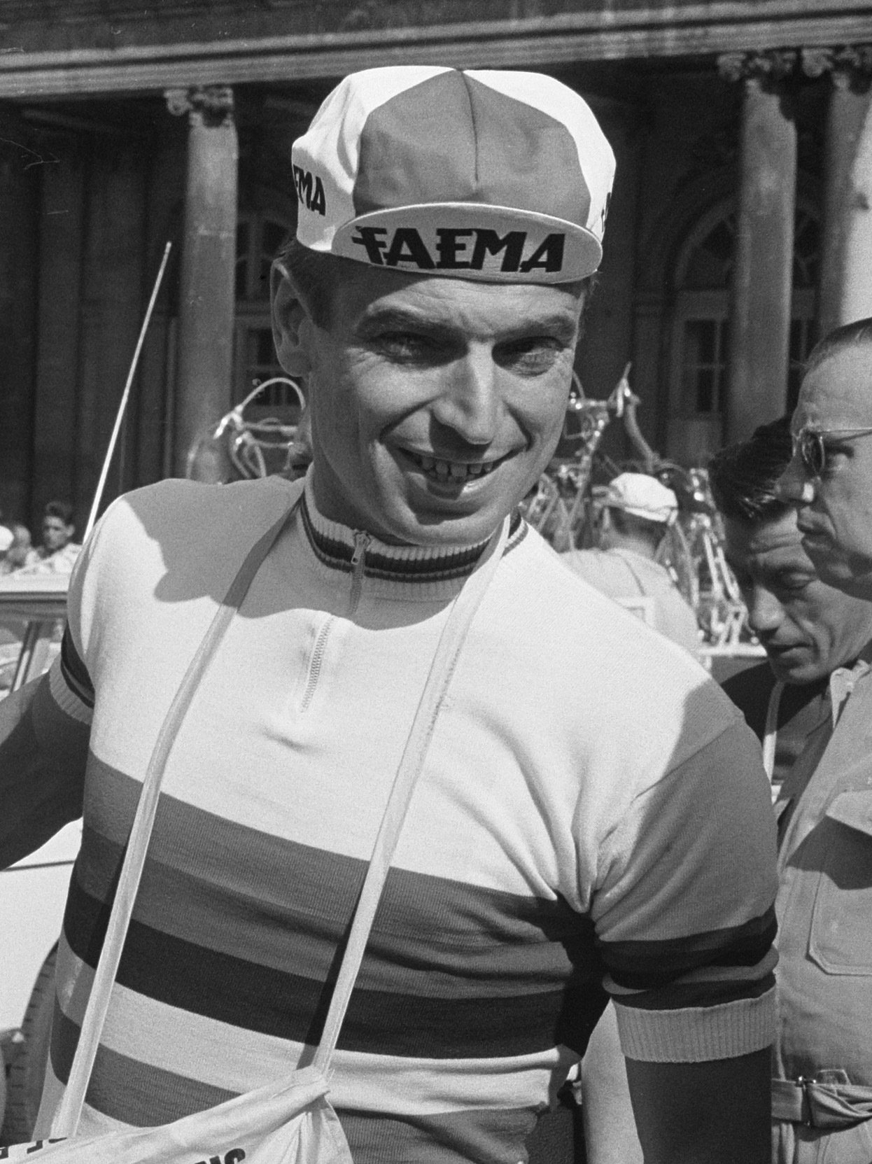 Tour de France 1962, Rik Van Looy